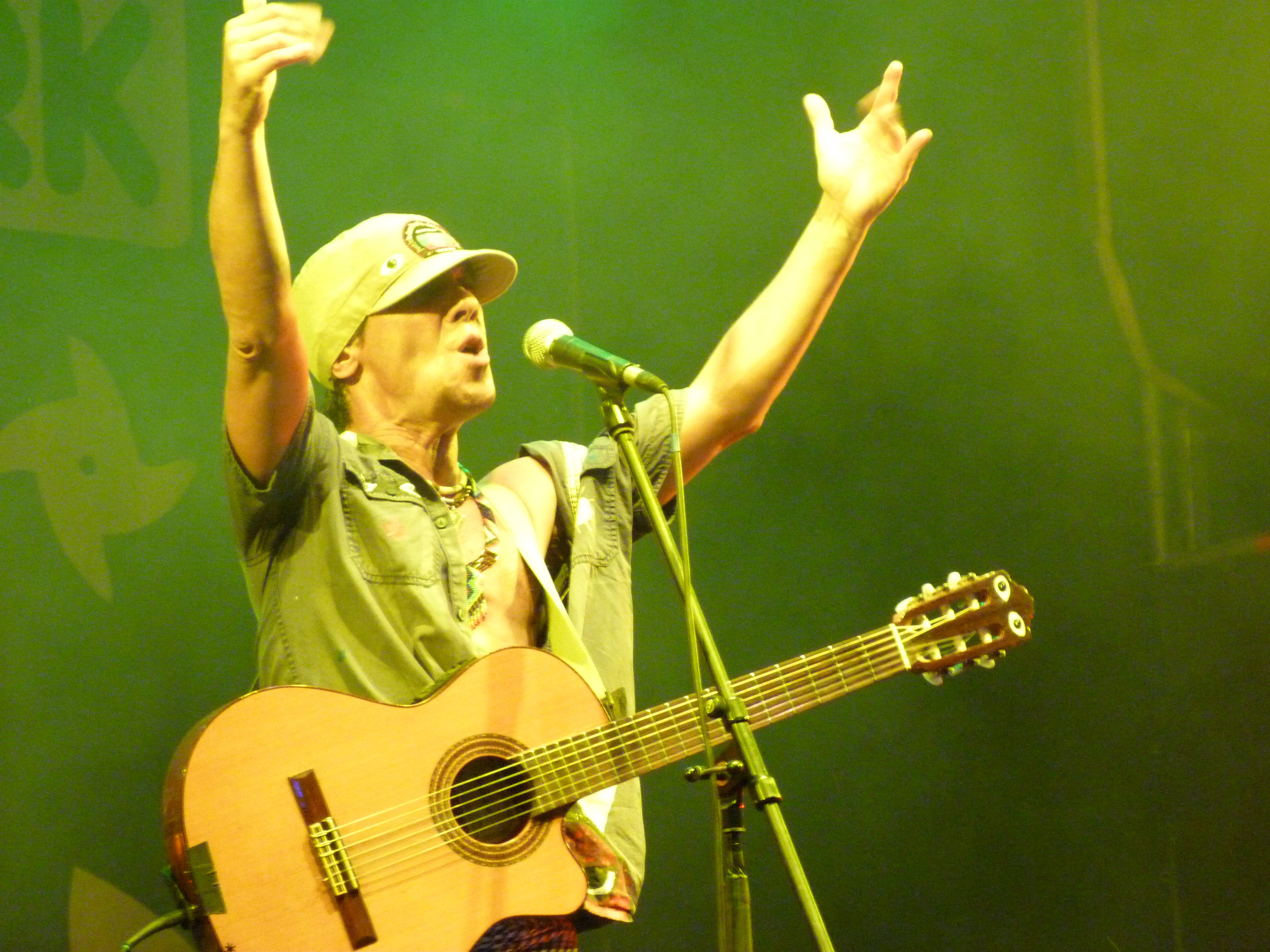 A felvétel 2013. szeptember 7 -én készült Budapesten, a Budapest Parkban (Budapest IX. Soroksári u. 60 szám). Manu Chao La Ventura. A kiváló hangulatú estén Manu nagyon sok ráadást játszott a lelkes közönségnek. José-Manuel Thomas Arthur Chao szülei emigráltak Franciaországba. Manu Párizs külvárosaiban szocializálódott, világzenét játszik. ©© Derzsi Elekes Andor, Budapest, 2013, You are authorised to use these photos and vids under Creative Commons – even for commercial, for profit purposes. Photos must be attributed to Derzsi Elekes Andor. All of the photos and vids in the Metapolisz DVD line are under Creative Commons and can be used even for commercial – for profit – purposes. Recommended Citation Derzsi Elekes Andor: Metapolisz DVD line Források: "Őrült Budapest!" – itt járt Manu Chao hozzáférés 20130910 Budapest Park hozzáférés 2013.0ö.10